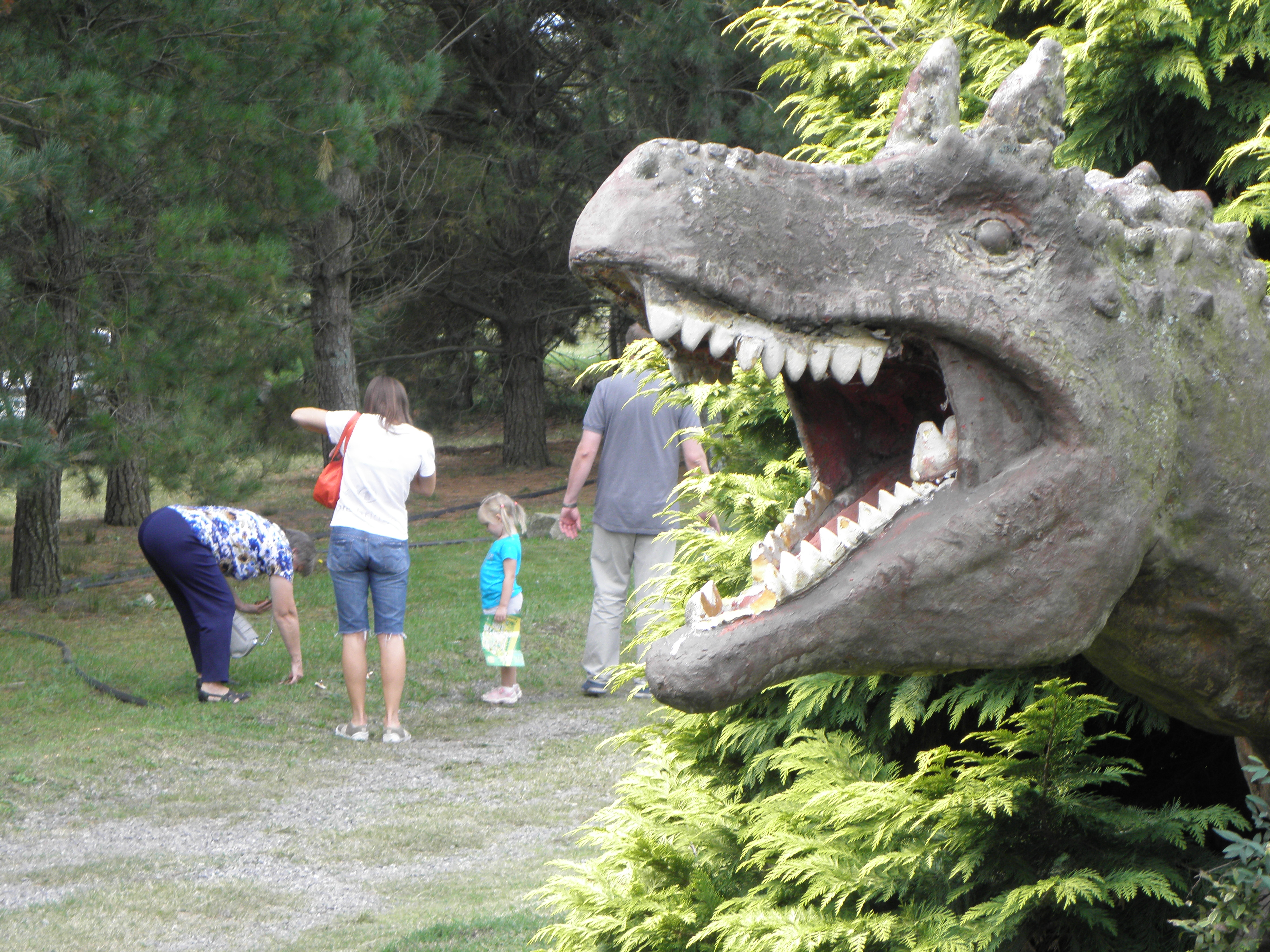 Una de las réplicas de dinosaurios a tamaño natural; Zoológico de Batán, provincia de Buenos Aires, Argentina.